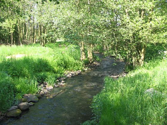 Stepenitz am Kloster Marienfließ, Brandenburg fotografiert im Mai 2005 von Lienhard Schulz